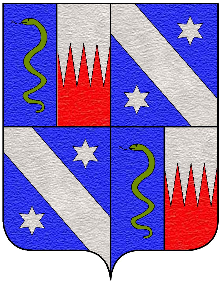 Stemma della famiglia Anguissola